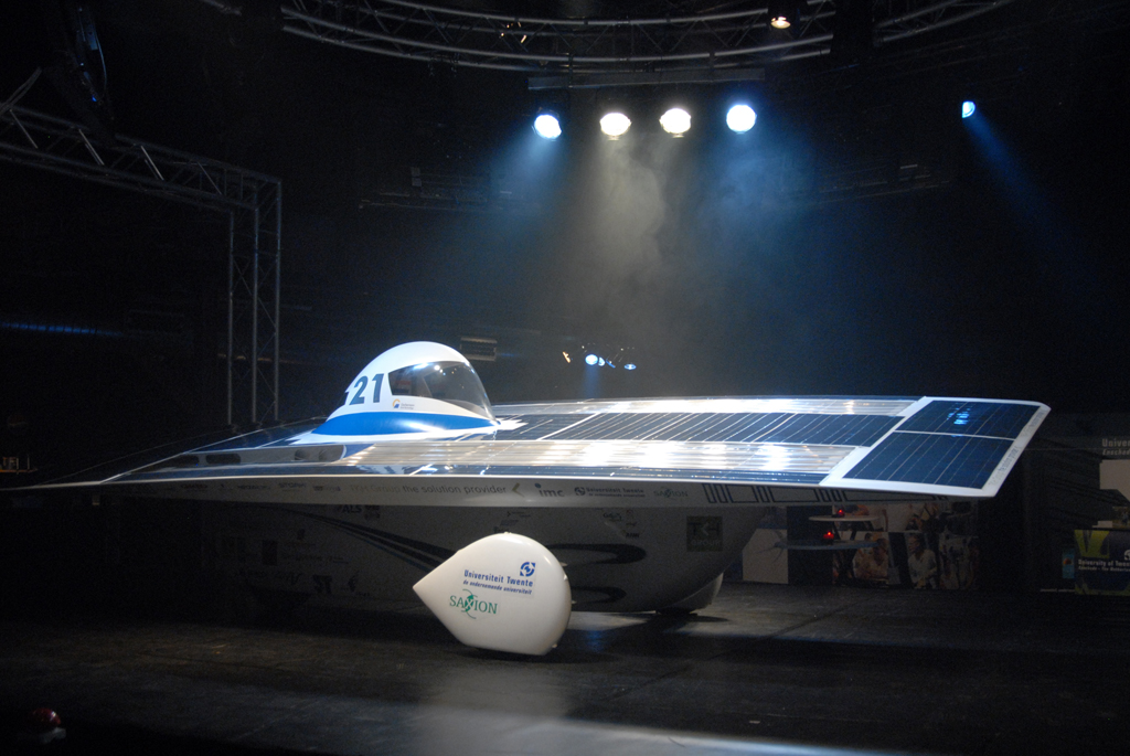 Autopresentatie Twente One